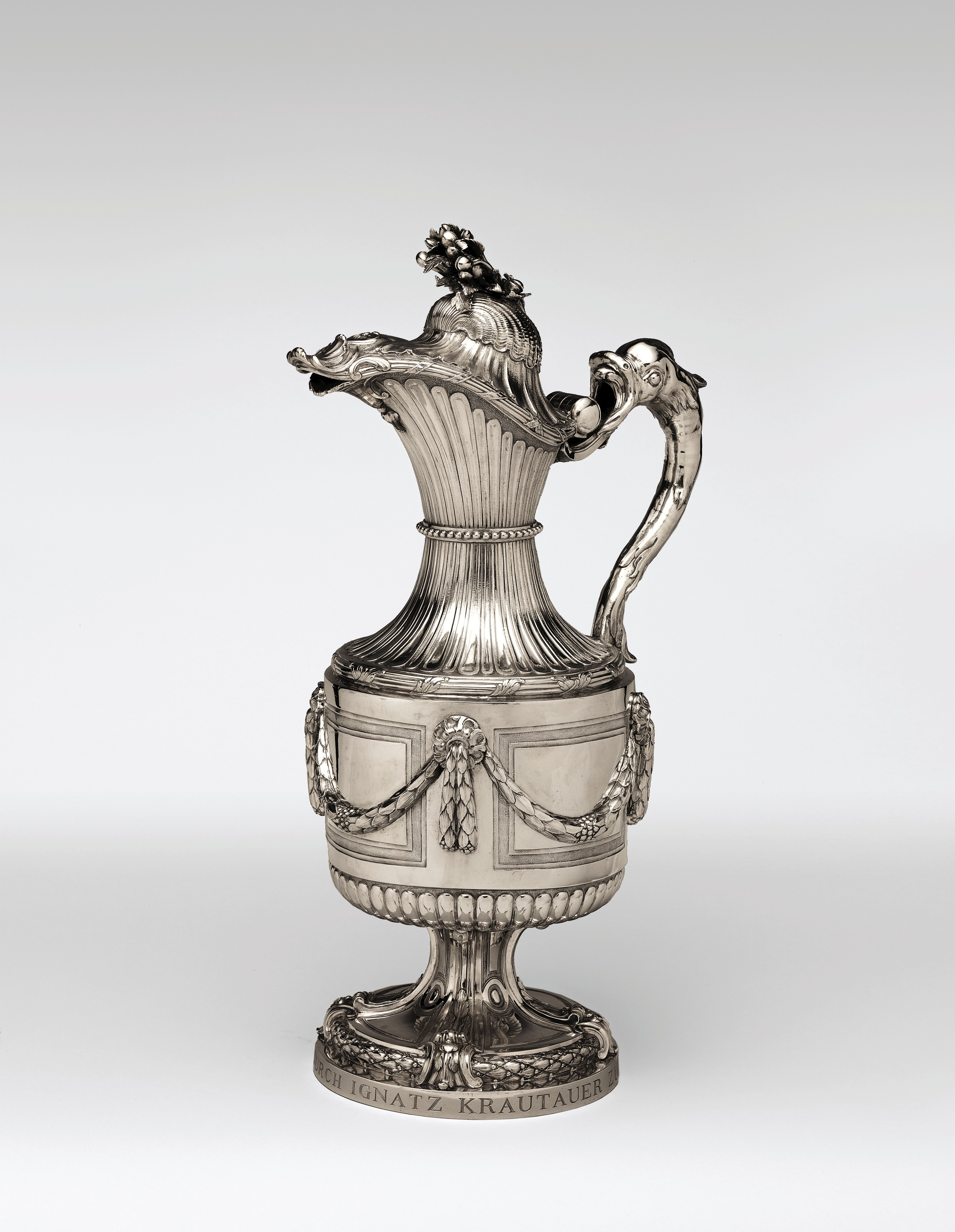 Austrian, Vienna; Ewer; Metalwork-Silver